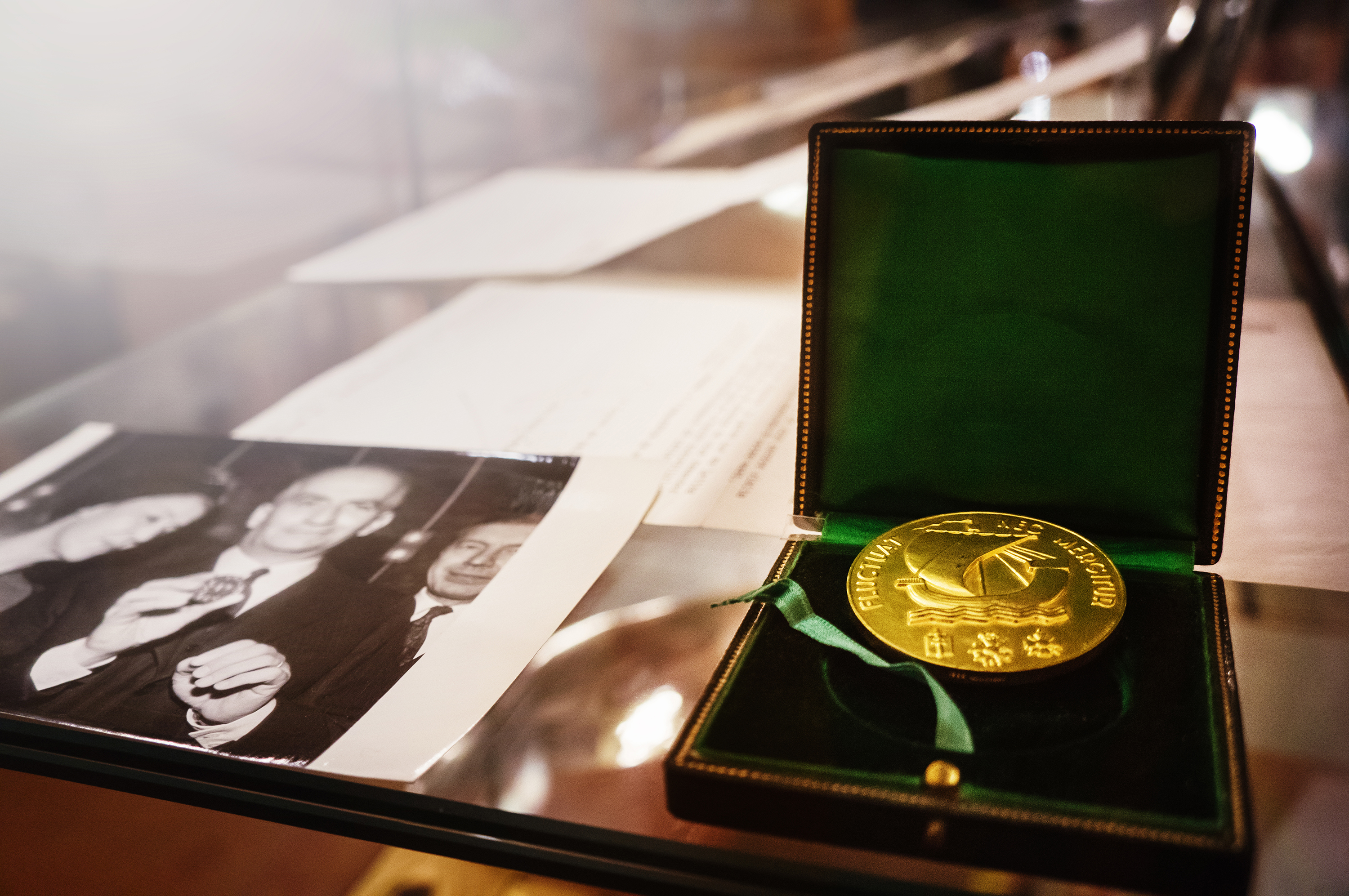 Médaille de vermeil de la Ville de Paris attribuée à Louis de Funès en 1970, pour son engagement pour la défense de la nature. Exposé au Musée Louis de Funès.